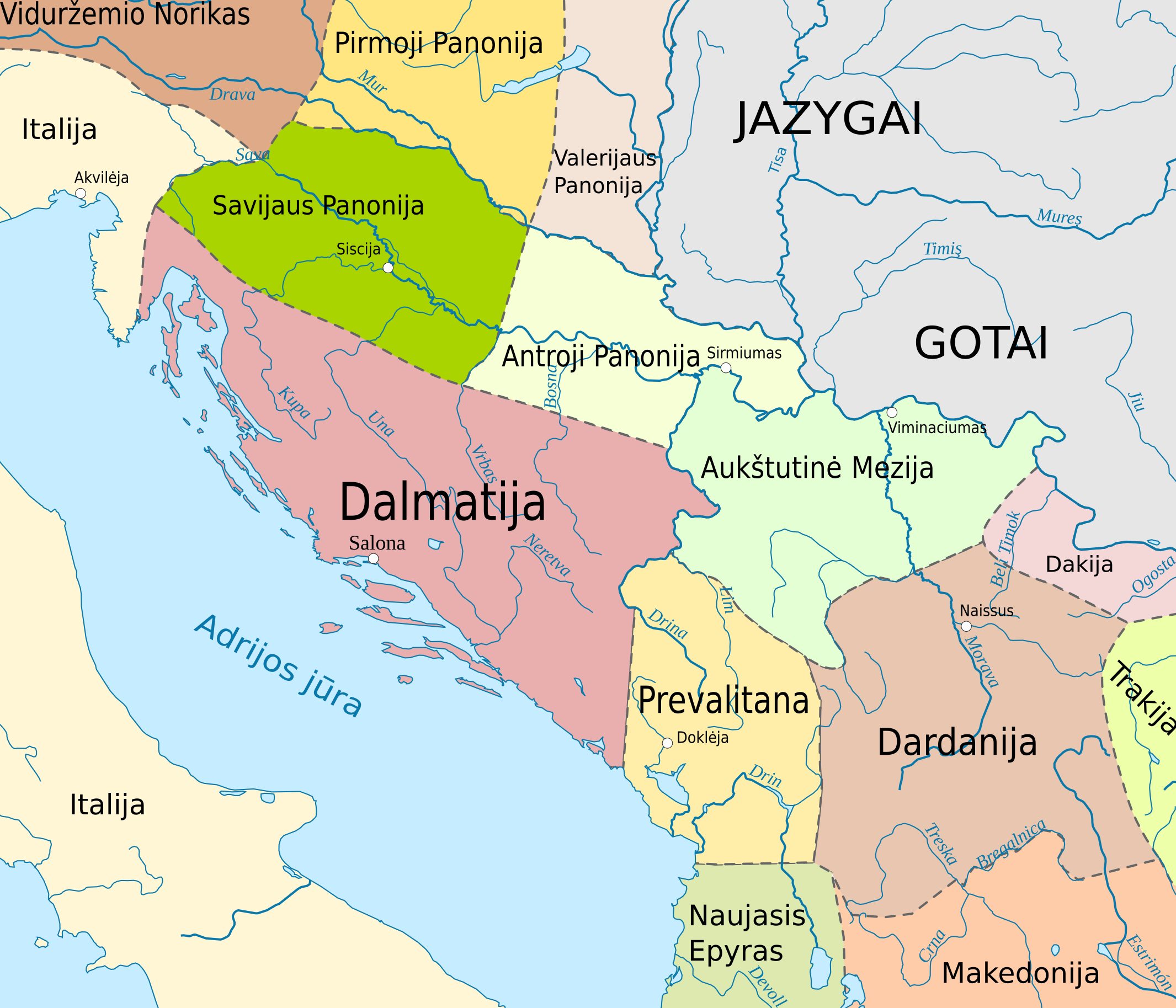 Dalmatija ir kaimyninės Romos provincijos Balkanuose IV a. Pgl.